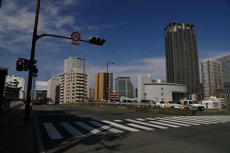 Jyouan-Bashi (bridge), Osaka City, Japan.